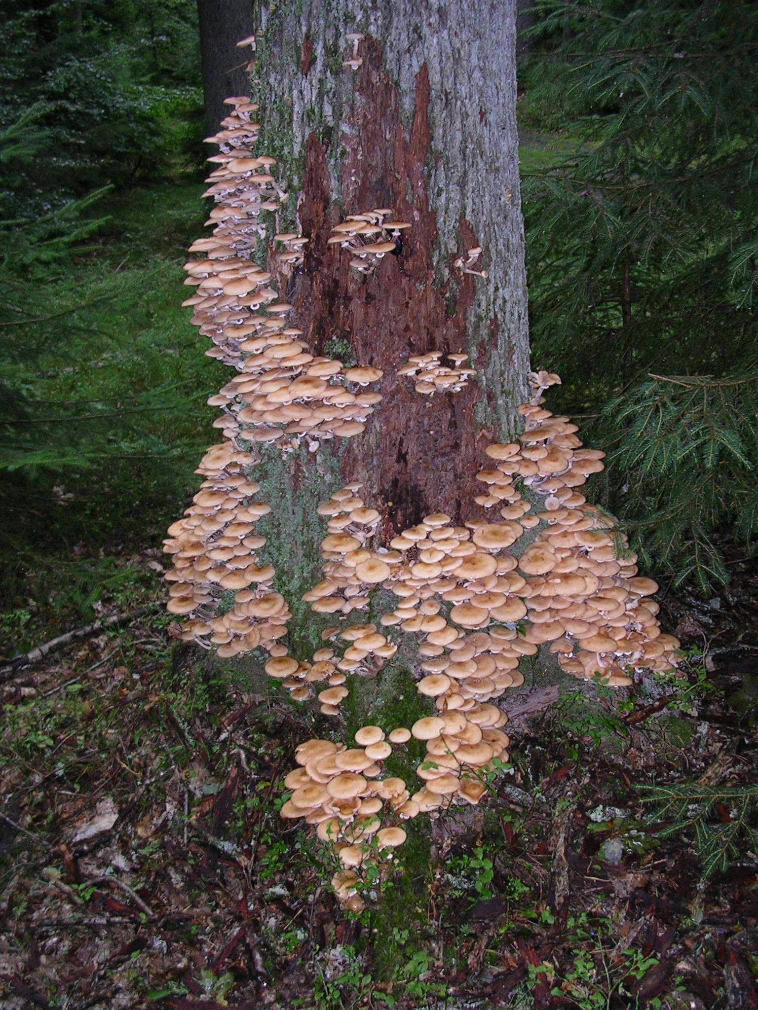 Armillaria